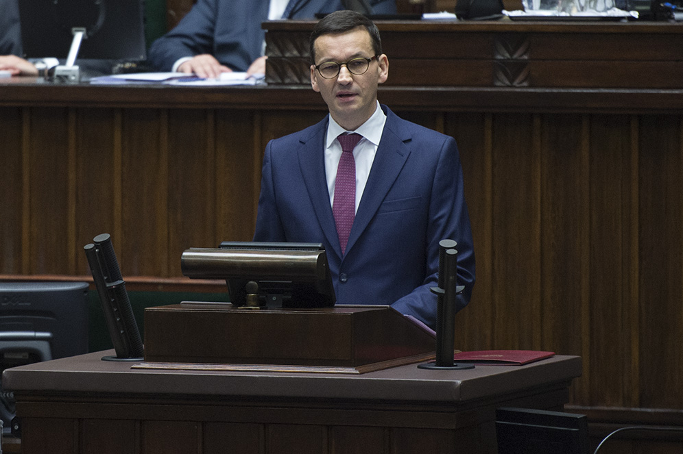 Sala Posiedzeń w Sejmie RP. Prezes Rady Ministrów Mateusz Morawiecki przedstawia program działania Rady Ministrów z wnioskiem o udzielenie jej wotum zaufania.